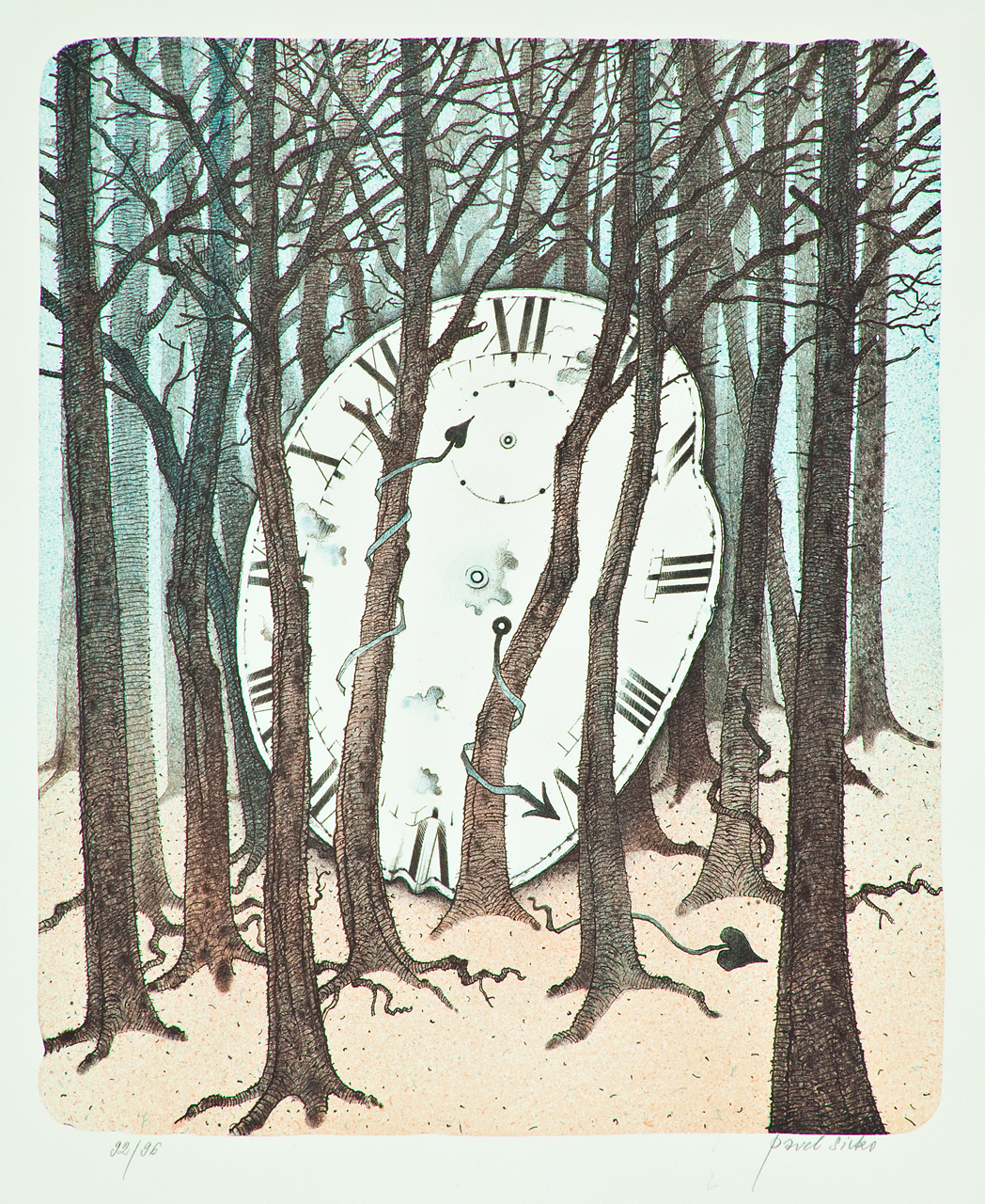 Pavel Sivko, Je na čase., barevná litografie